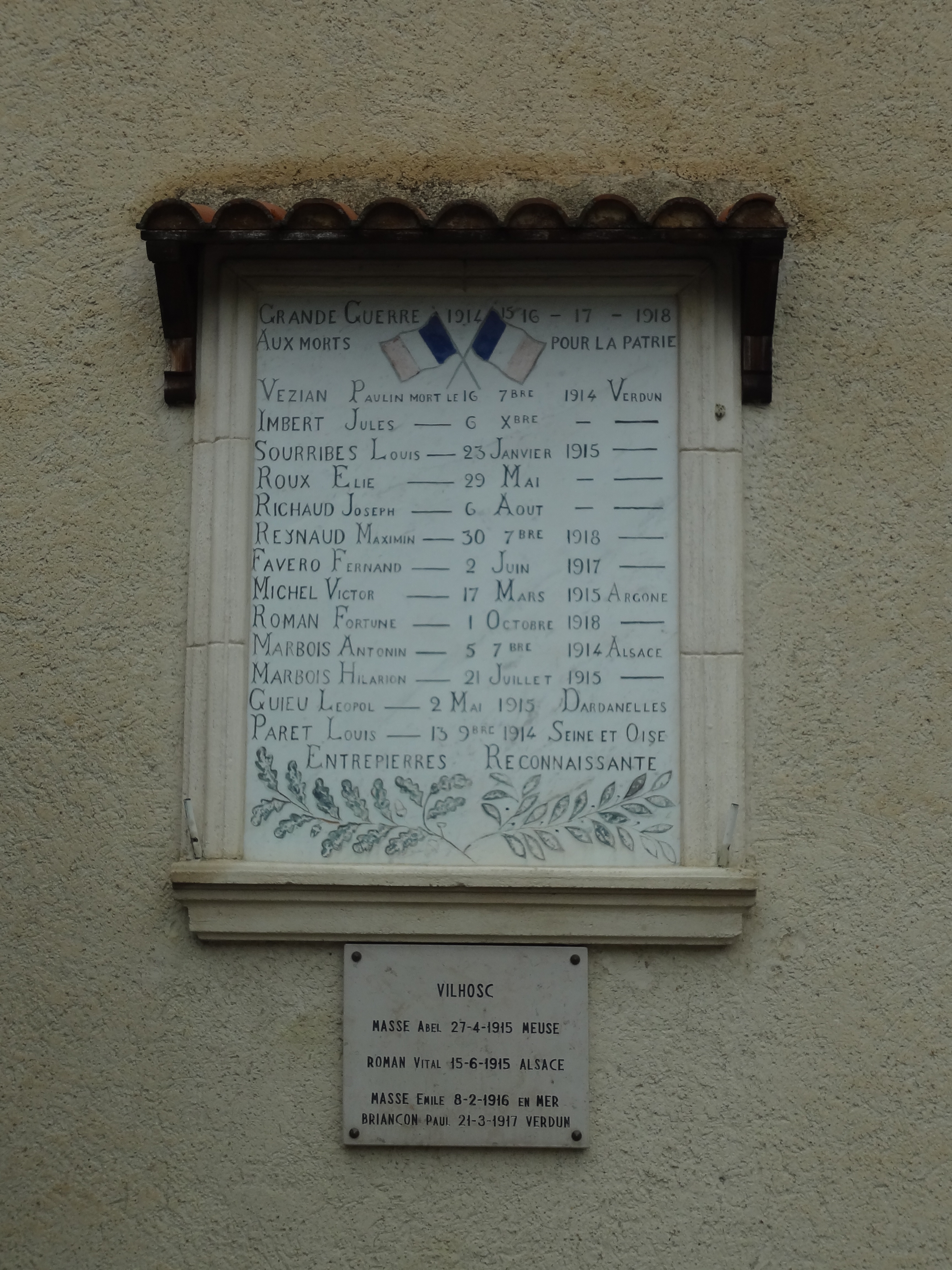 Les morts de la commune de Vilhosc, commune rattachée en 1975, sont présents sur une plaque séparée